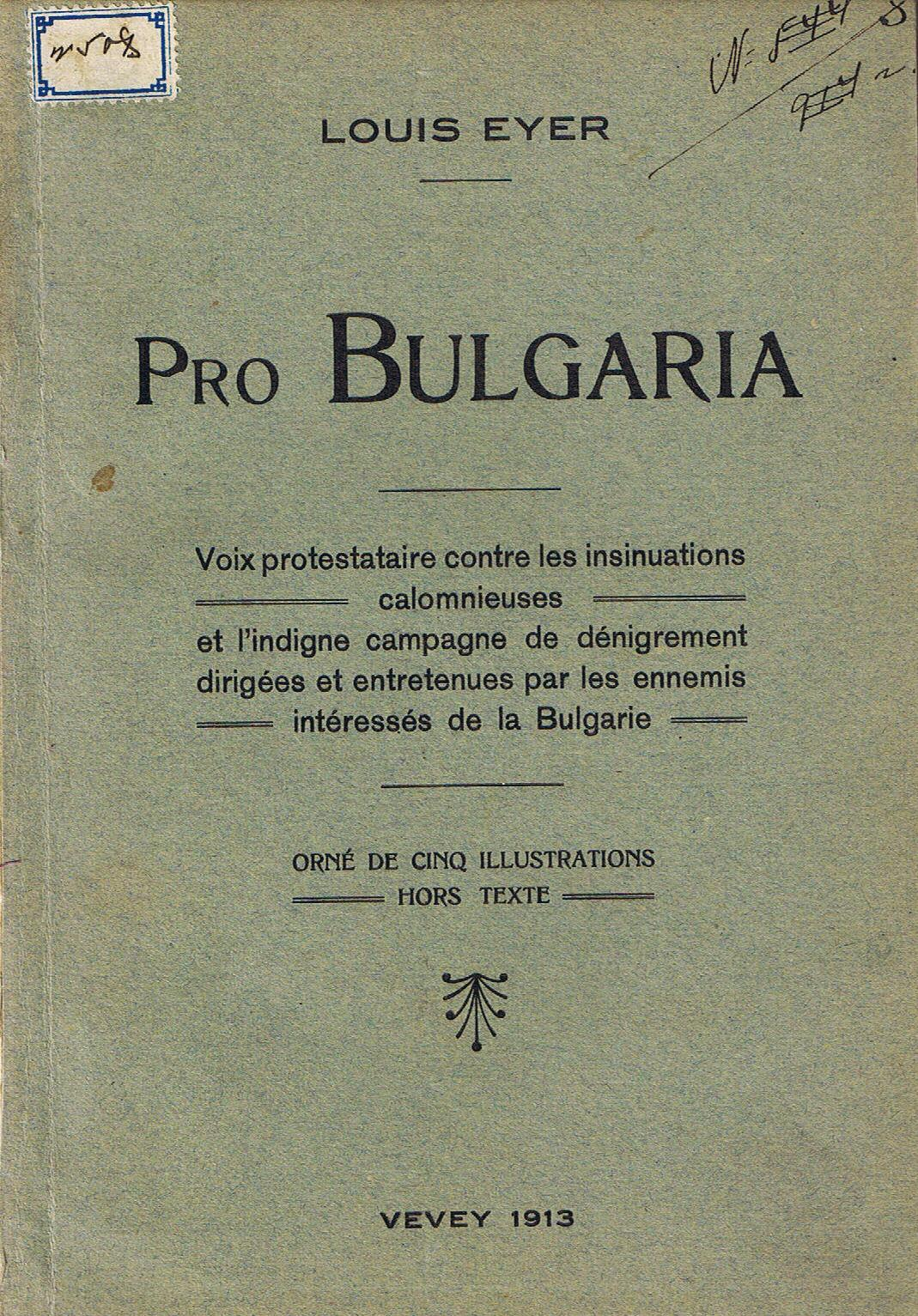 Корица на Pro Bulgaria на Луи Айер.